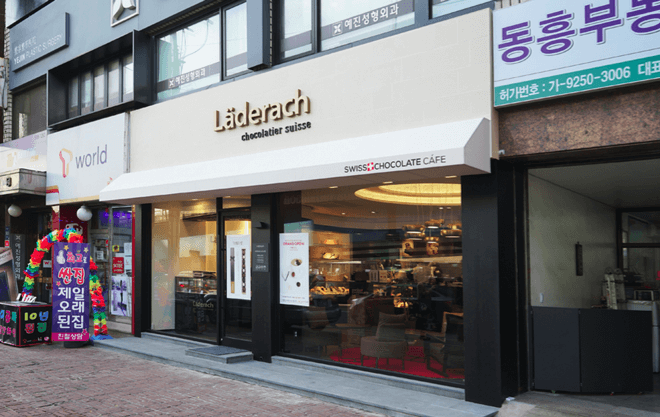 chocolate boutiques Läderach